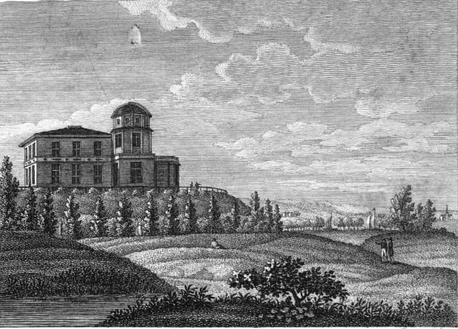 Sternwarte der Universität Königsberg in Preußen